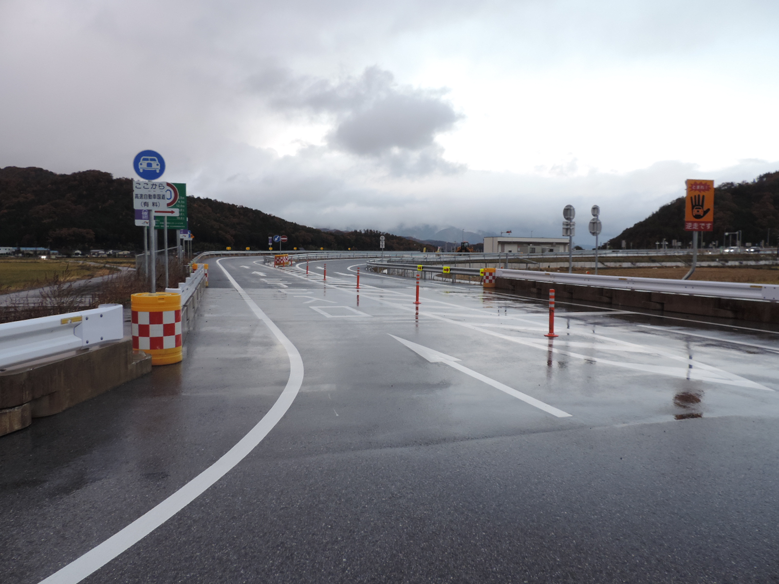 小谷城スマートインターチェンジ上り線出入口。2017年撮影